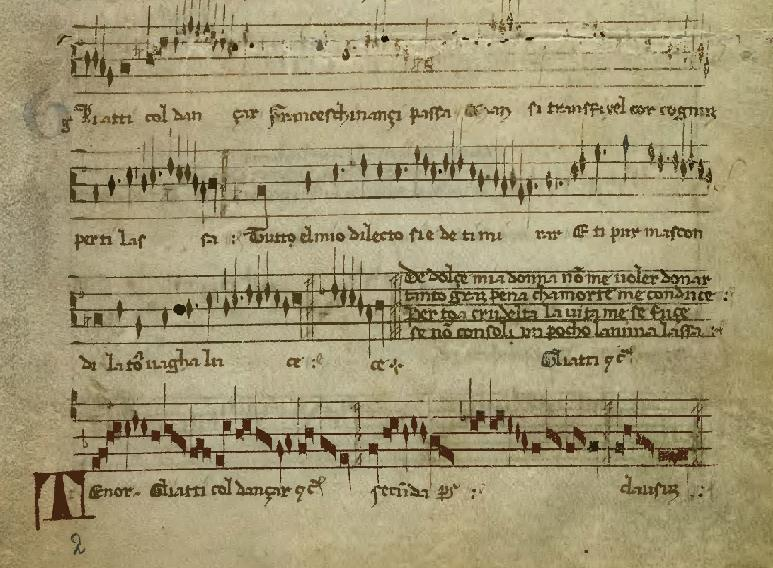 Codex Mancini